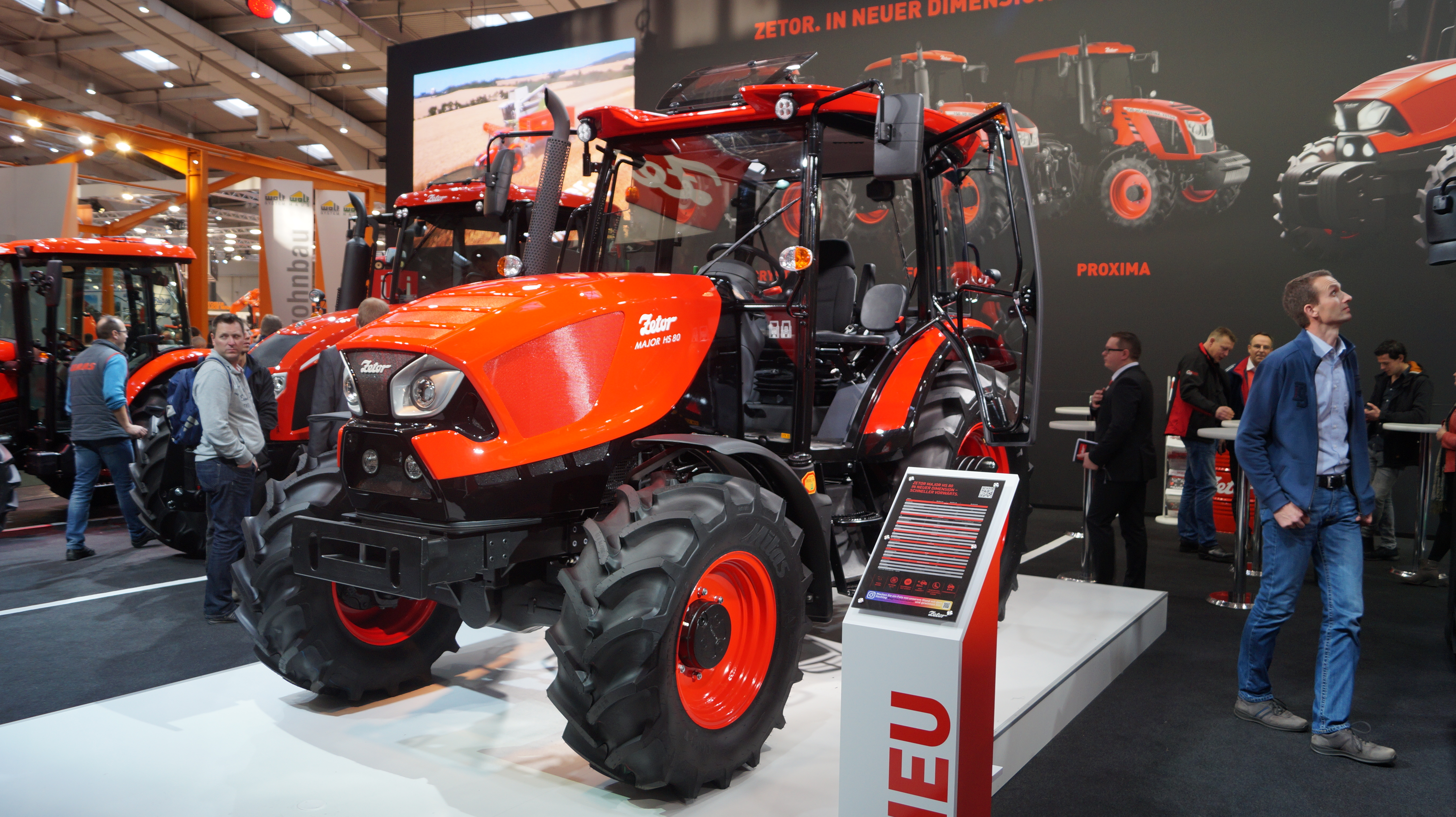 Schrägansicht der Front eines Zetor Major HS 80, ausgestellt auf der Agritechnica 2017.